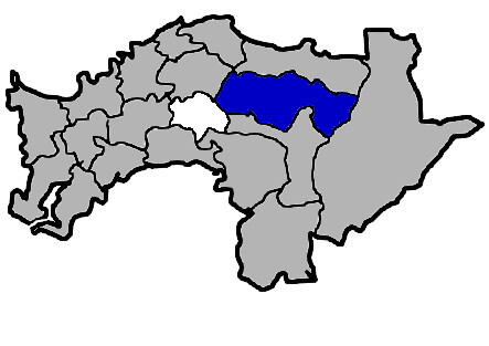 KaurJmeb為編輯中華民國臺灣省嘉義縣竹崎鄉，於2005年2月10日所繪。